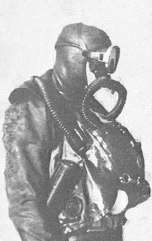 Description : Nageur de combat équipé de l'appareil Oxygers utilisé depuis 1957